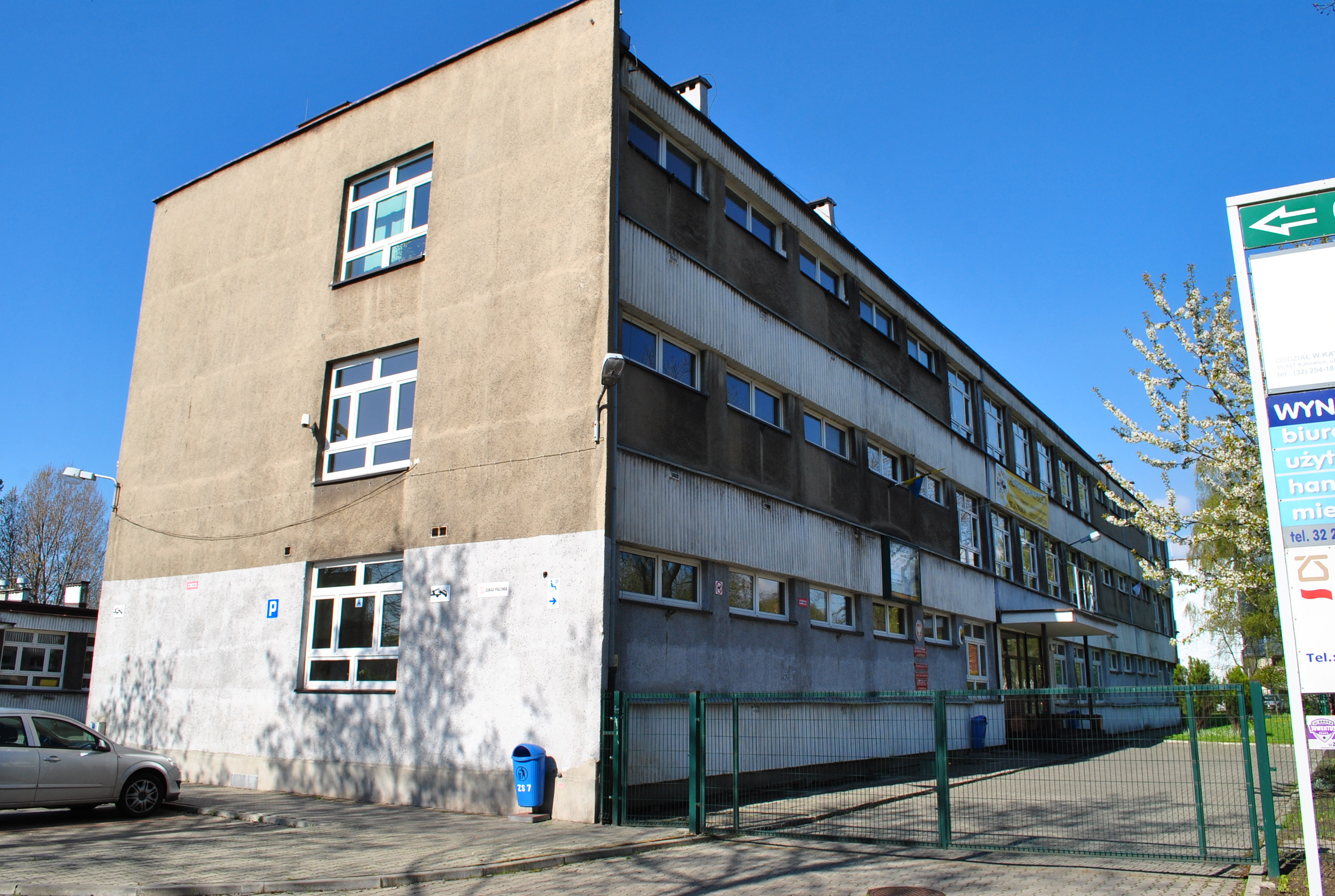 Katowice - Załęże. Zespół Szkół nr 7 im. Stanisława Mastalerza przy ul. Gliwickiej 228